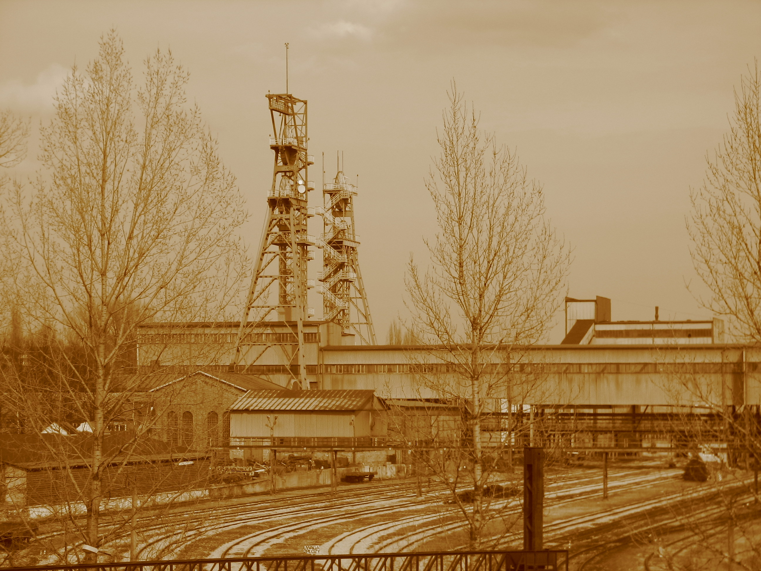 KWK Kazimierz-Juliusz w Sosnowcu Kazimierzu Górniczym